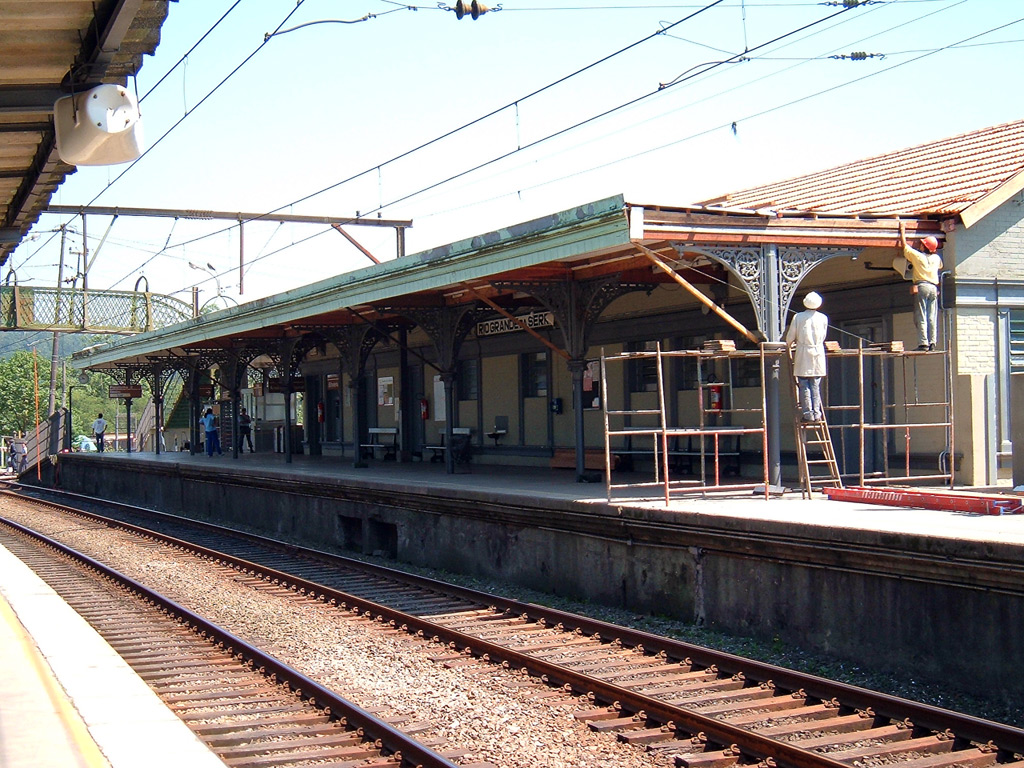 Estação da CPTM, foto tirada no começo do ano. An old commuter train station, still functional.